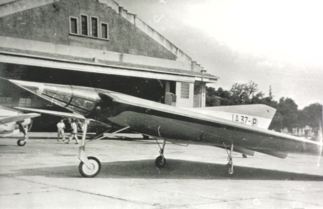 FMA I.A.37 planeador completado con su esquema de pintura en colores de la bandera argentina, frente al hangar 3 de la Fábrica.